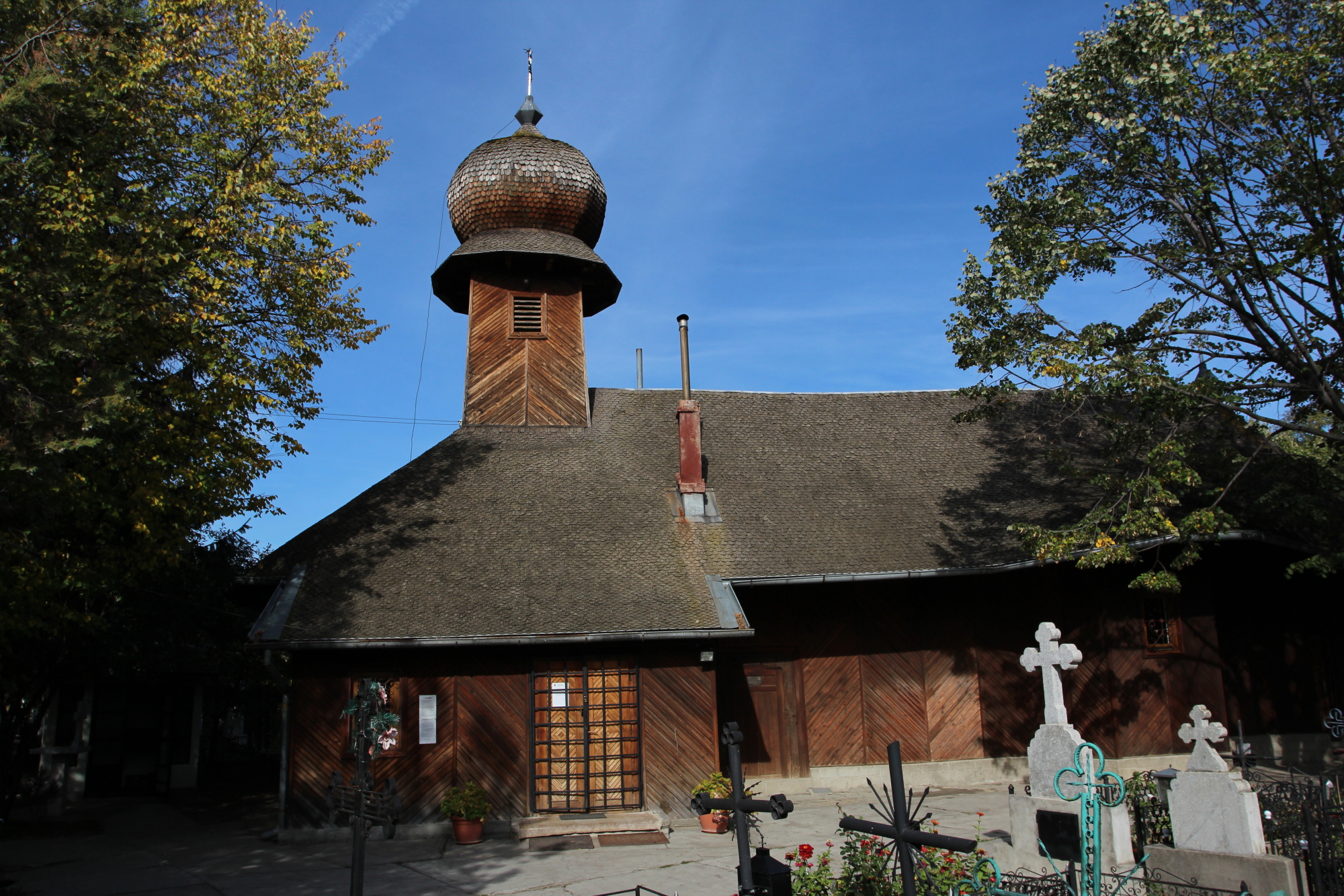 Biserica de lemn "Adormirea Maicii Domnului" 01